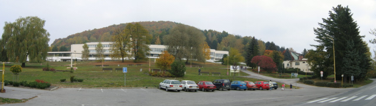 Nimnica - kupele, okt. 2006 author:Juloml